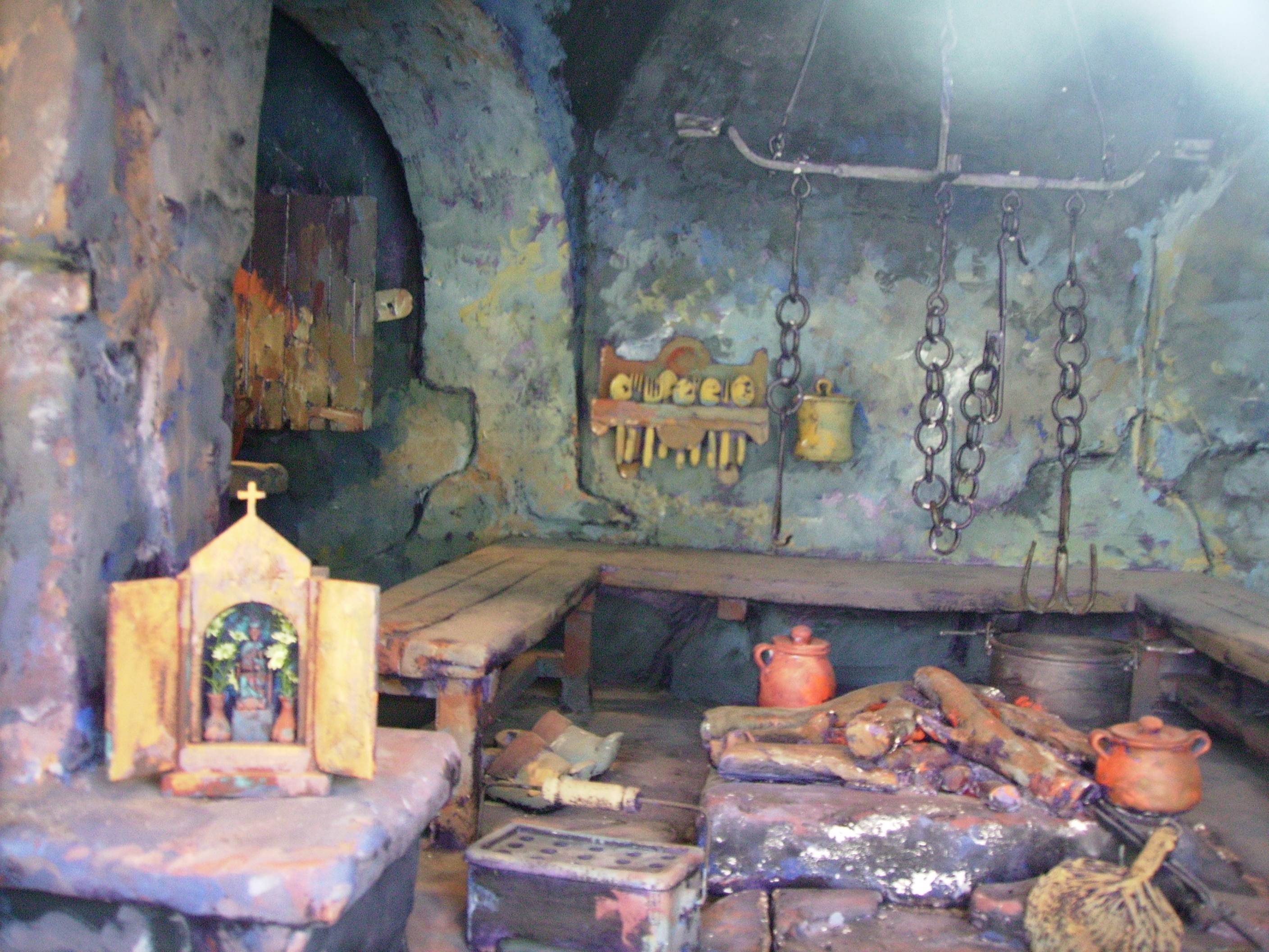 Diorama a l'exterior de l'ermita de Sant Gil amb les ofrenes dels pastors